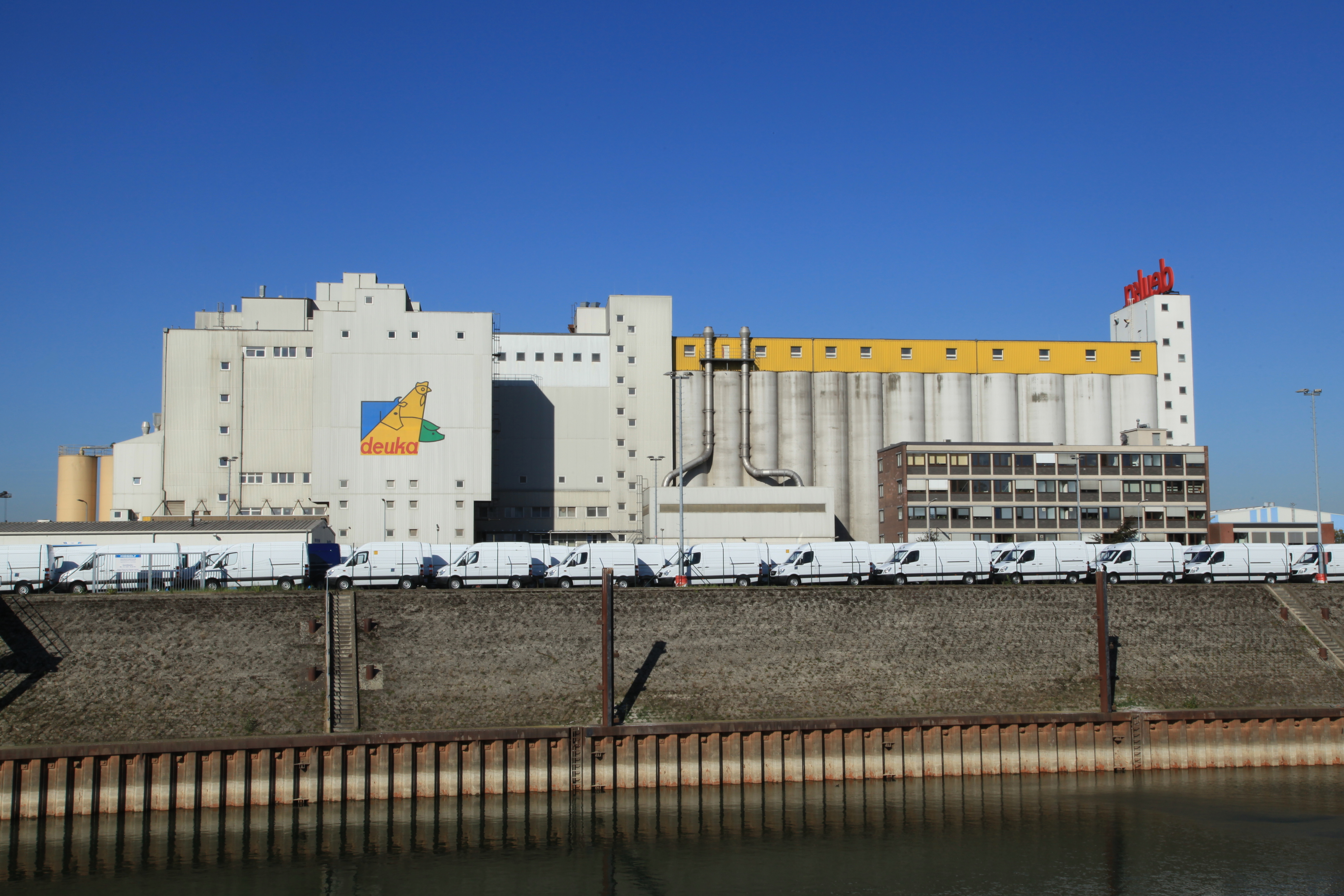 Blick von der Kesselstraße auf die Deutsche Tiernahrung Cremer und das Hafenbecken B in Düsseldorf